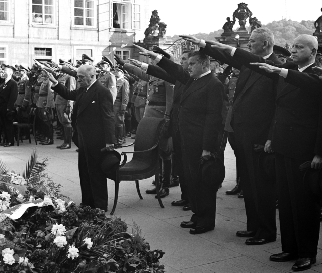 Эмиль Гаха у гроба Рейнхарда Гейдриха